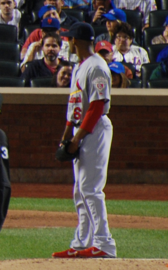 Sam Freeman